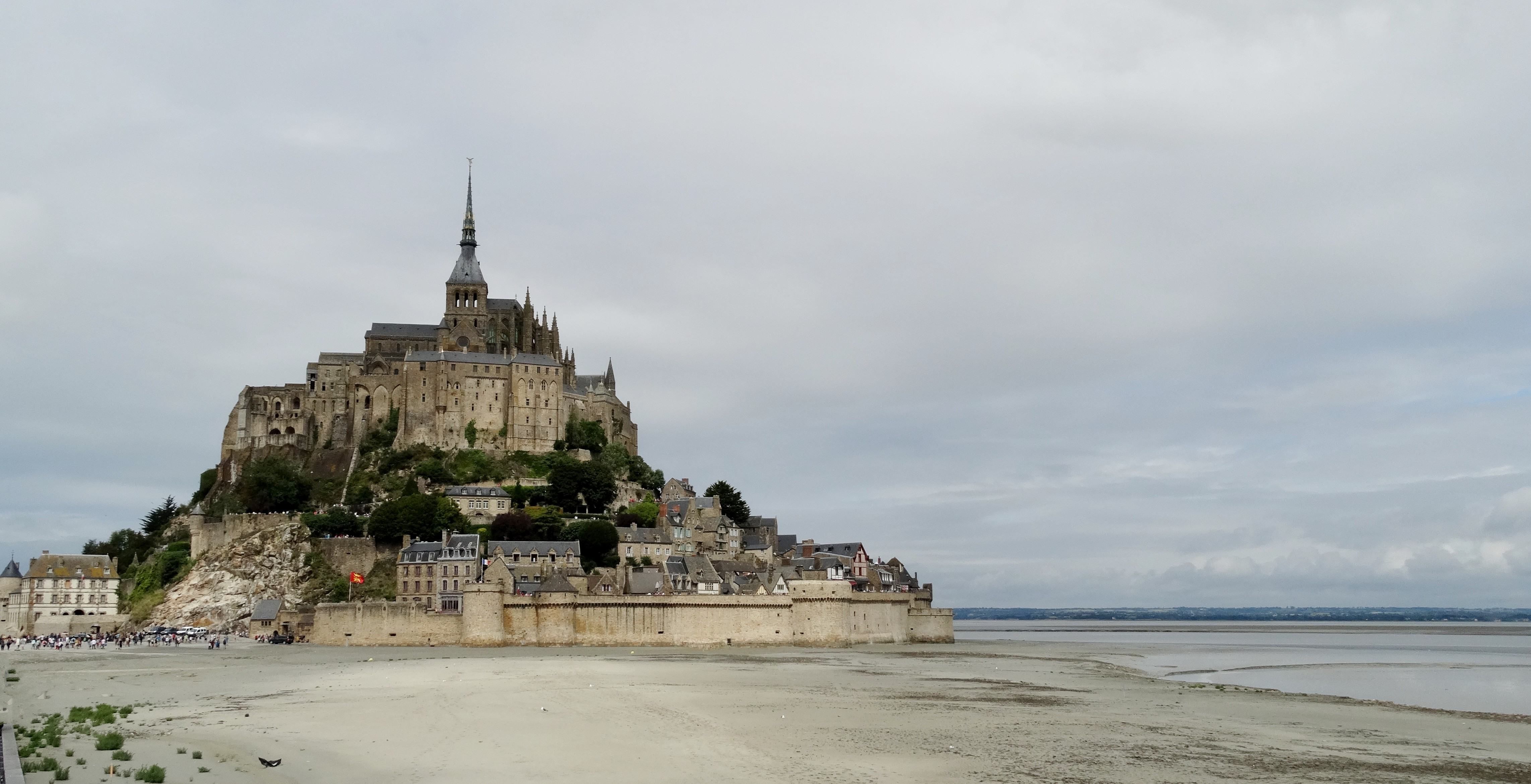 France - St. Malo, Le Mont Saint Michel